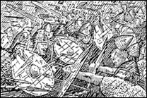 Norse battle scene